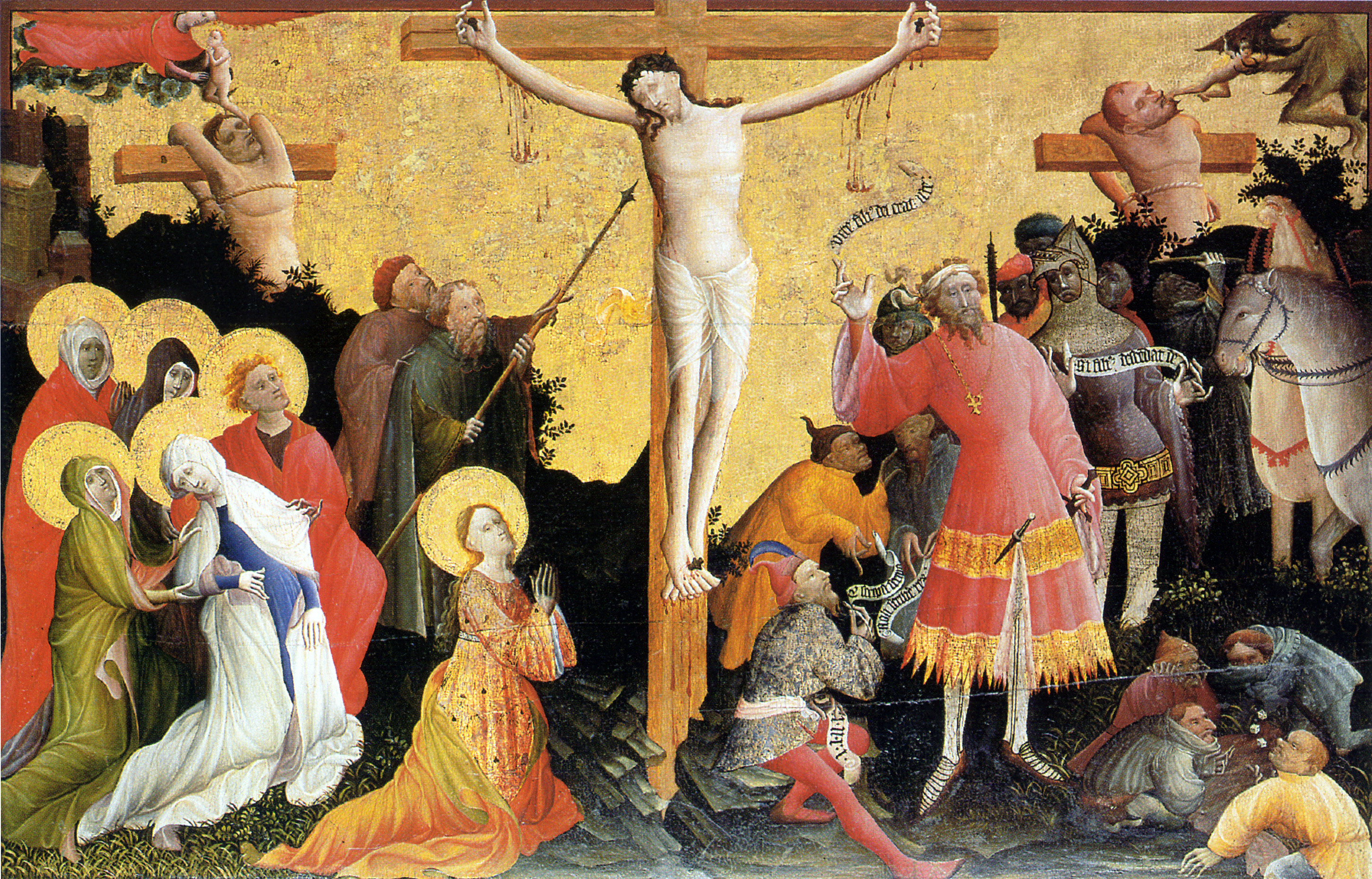 Berswordt-Altar, mittlere Tafel